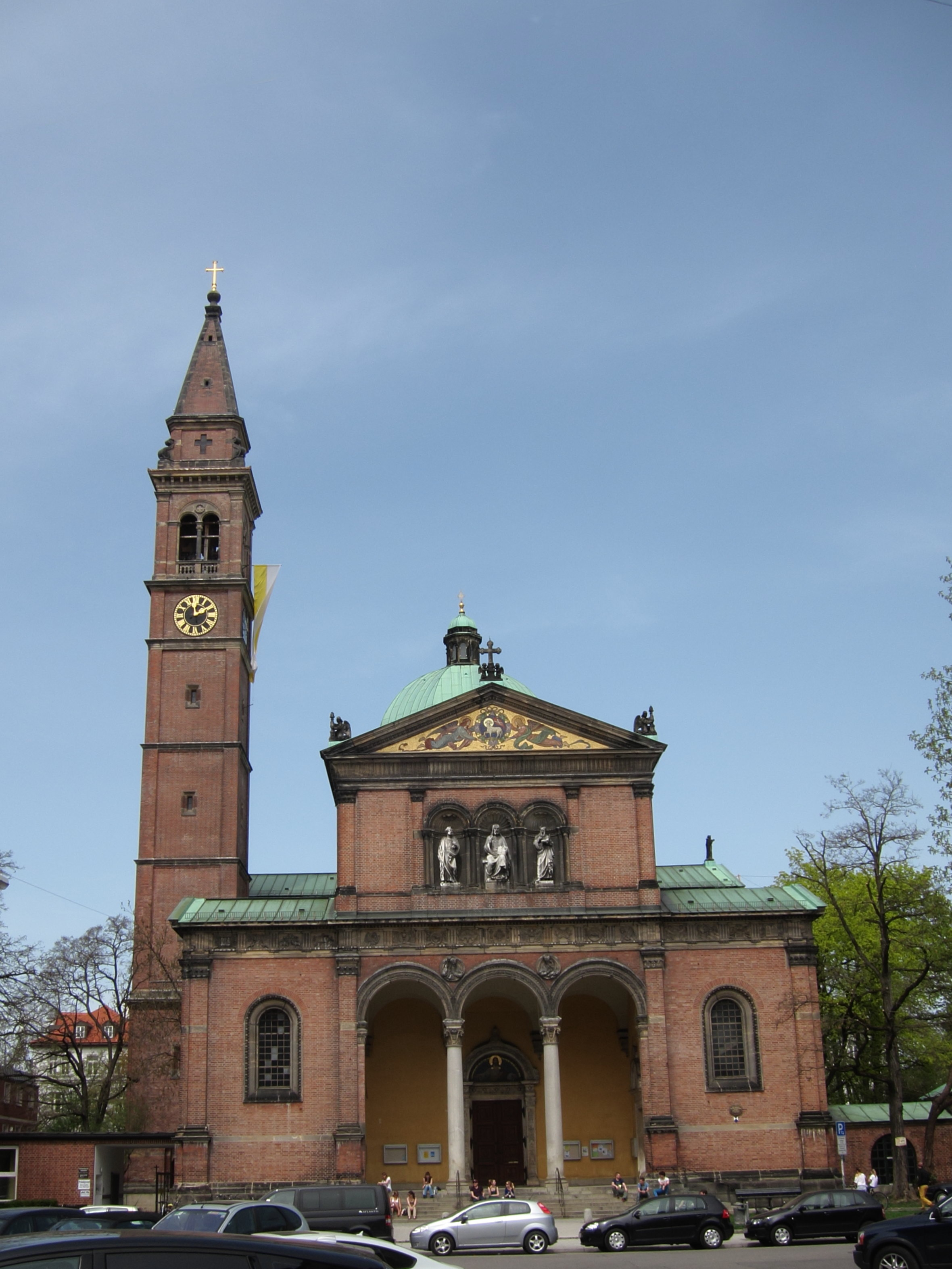 Kaiserplatz; kath. Pfarrkirche St. Ursula, dreischiffige backsteinsichtige Basilika in Formen der italienischen Renaissance mit Vierungskuppel und Portikus, von August Thiersch, 1894–97; mit Ausstattung; Campanile, freistehender backsteinsichtiger Spitzdachturm, gleichzeitig.